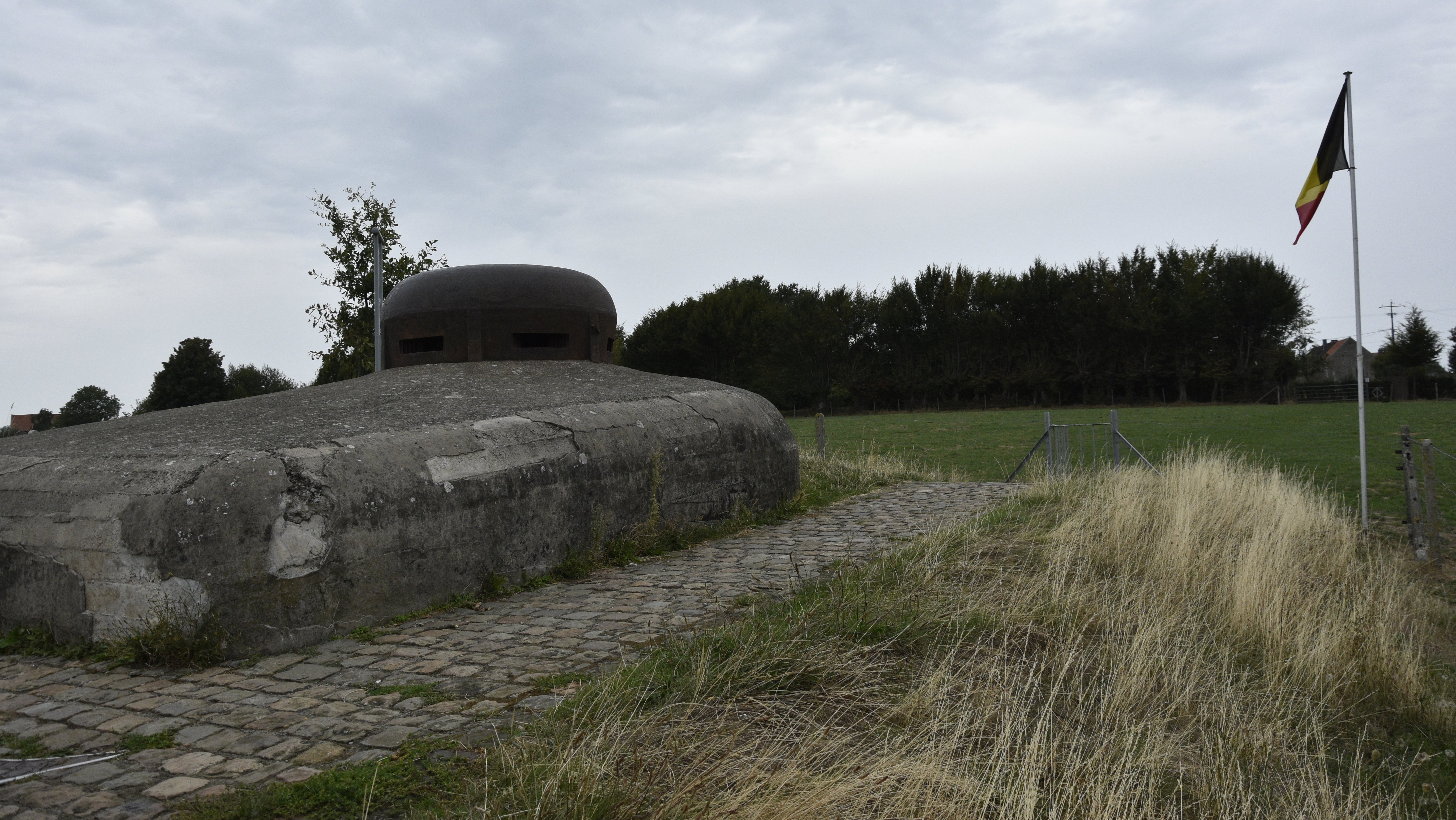 Sint-Jansrade (Knuppelstock) observatiepost MN18 (1934-1935) 29-08-2018 This photo of immovable heritage has been taken in the Walloon Region